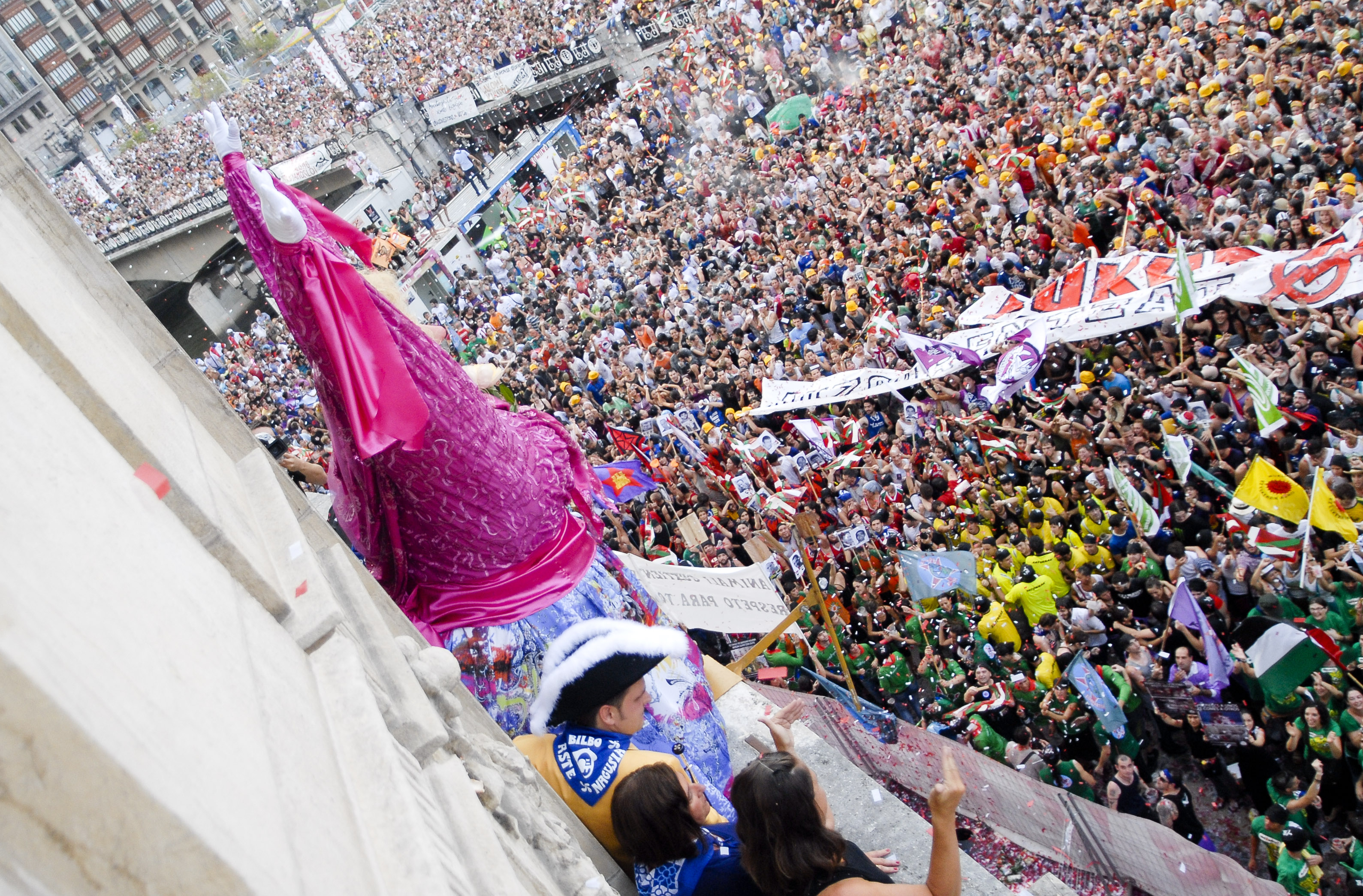 Larunbata20-76